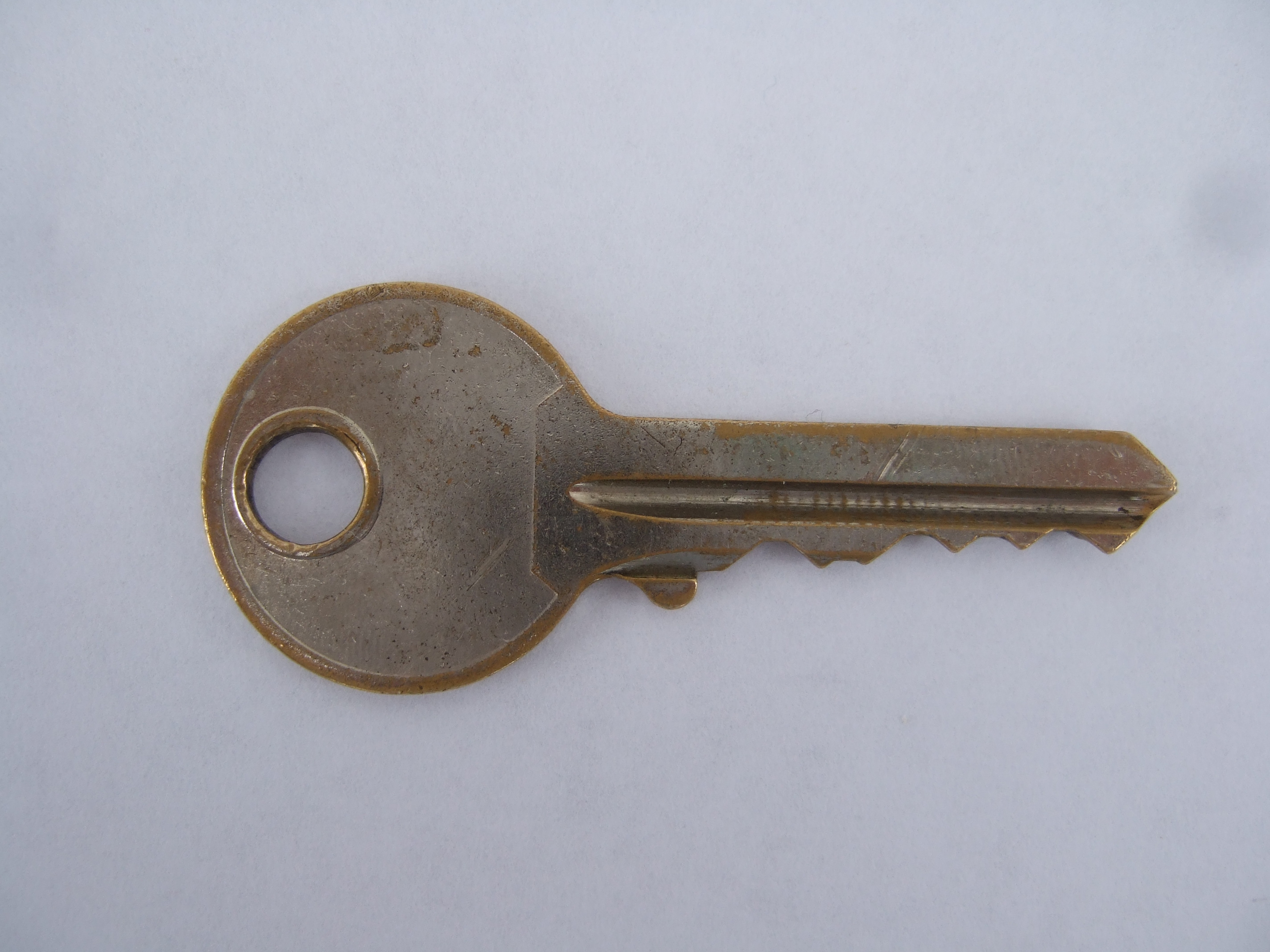 clé normale